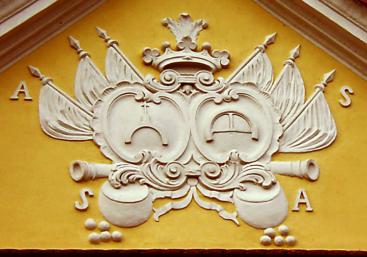 Wąsowo, dwór Sczanieckich, herby na frontonieAuthor: Stanisław Nowak, Poznań, Poland.Archiwum "Roweromaniaka wielkopolskiego" 2004-09-11, No_177-42a